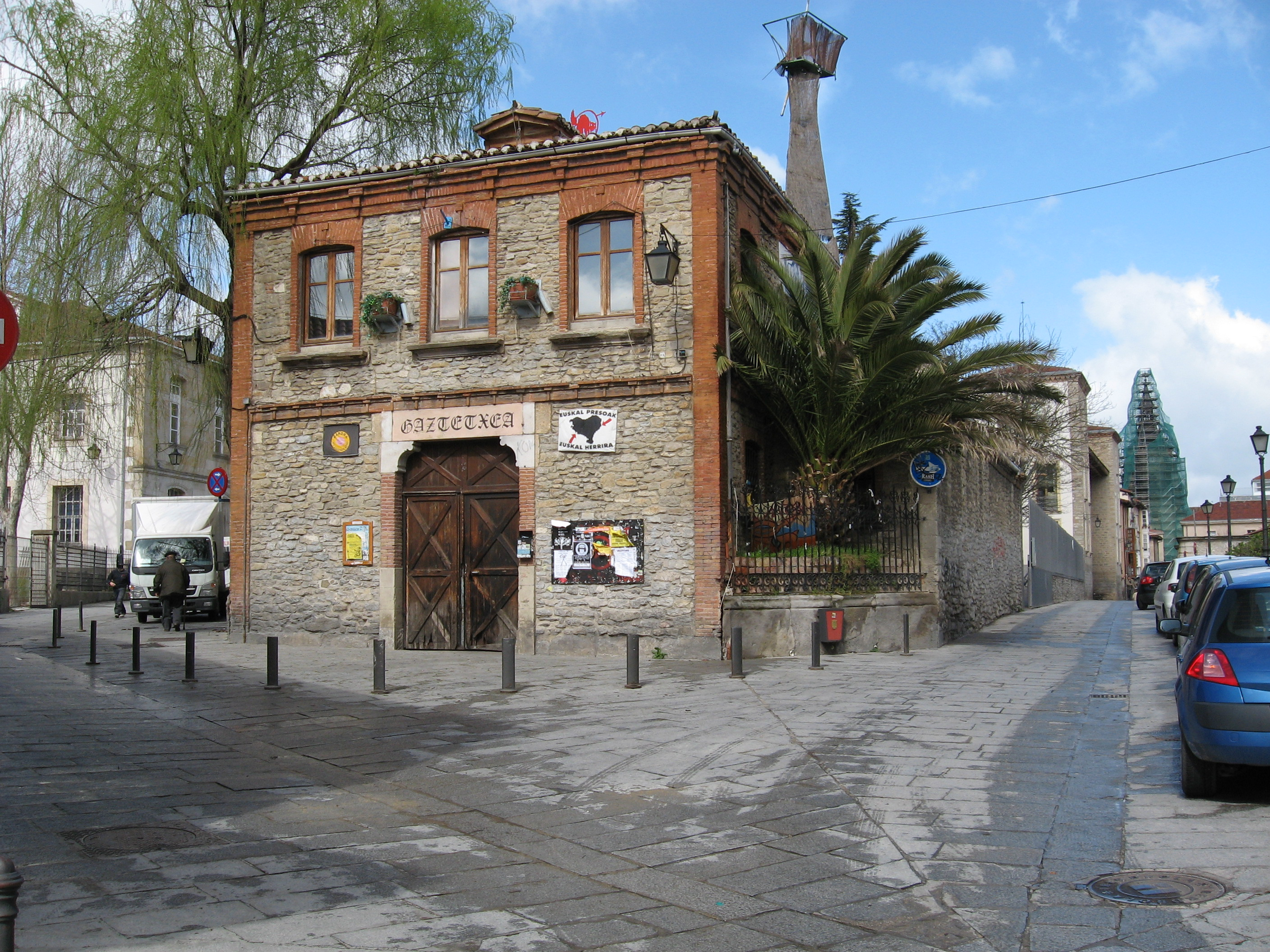 Desc: Gaztetxe de Vitoria-Gasteiz